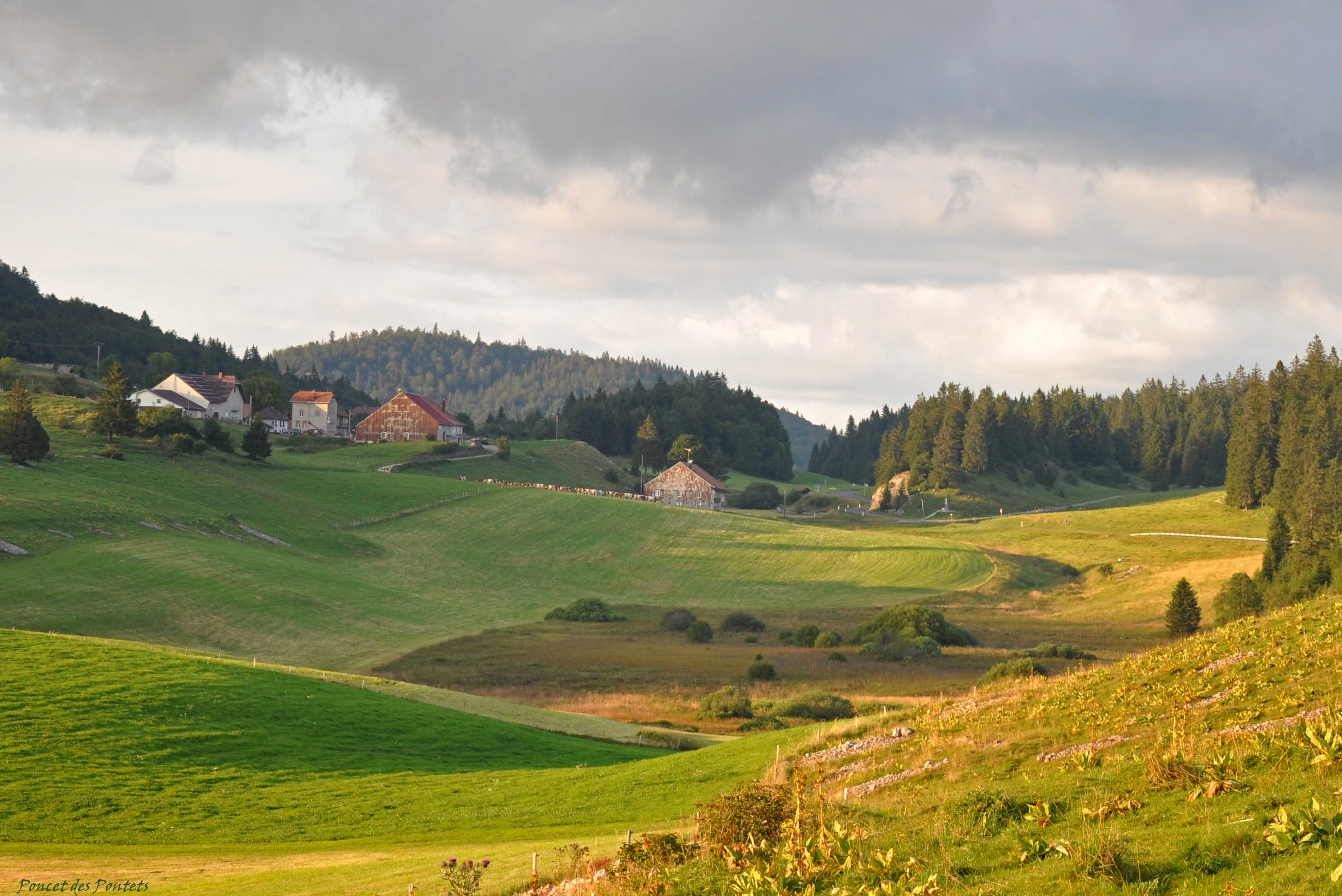 RONDEFONTAINE F25240